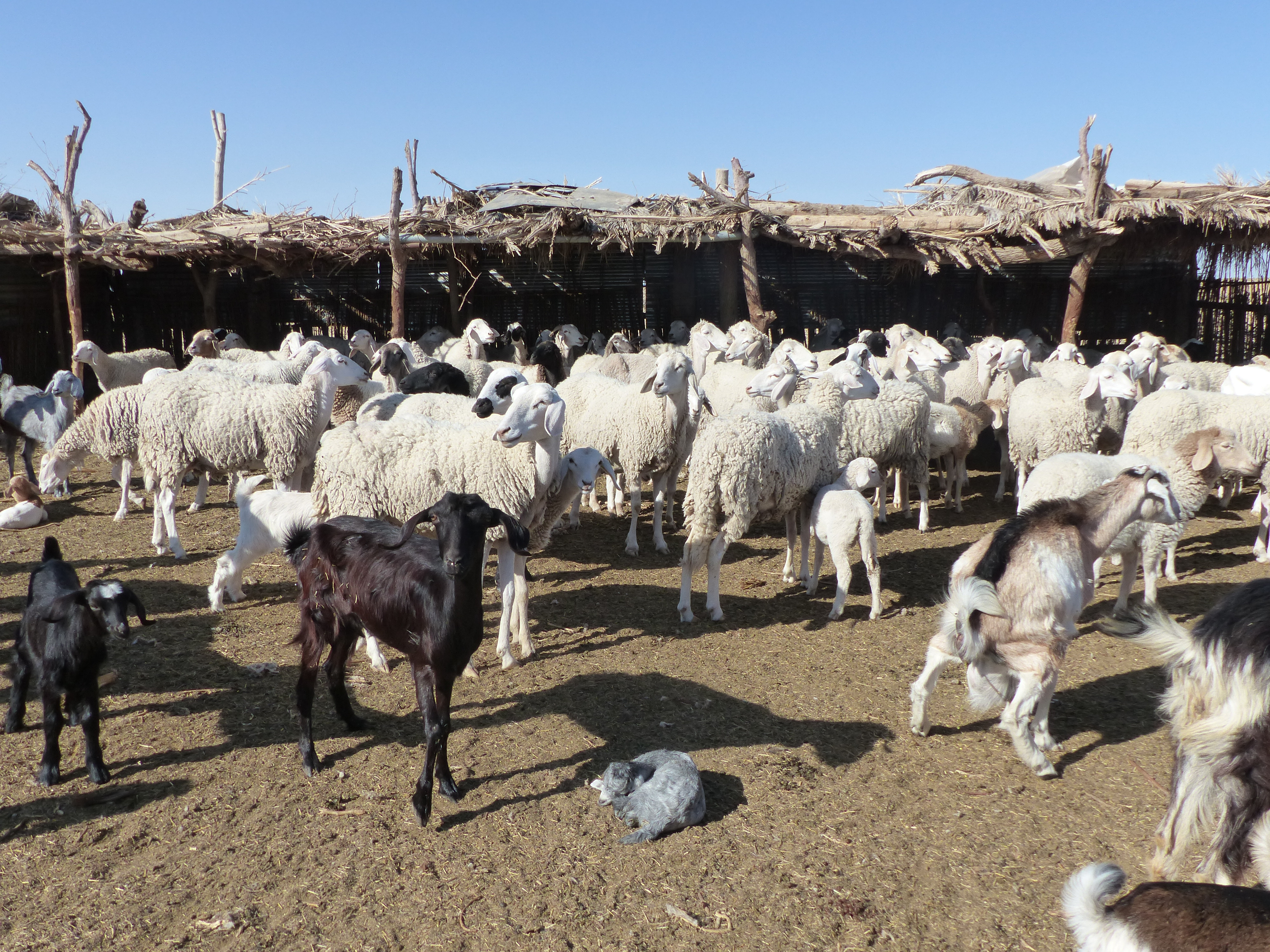 Troupeau mixte d'ovins de race Queue fine de l'Ouest, et de chèvres, entre Tozeur et Nefza